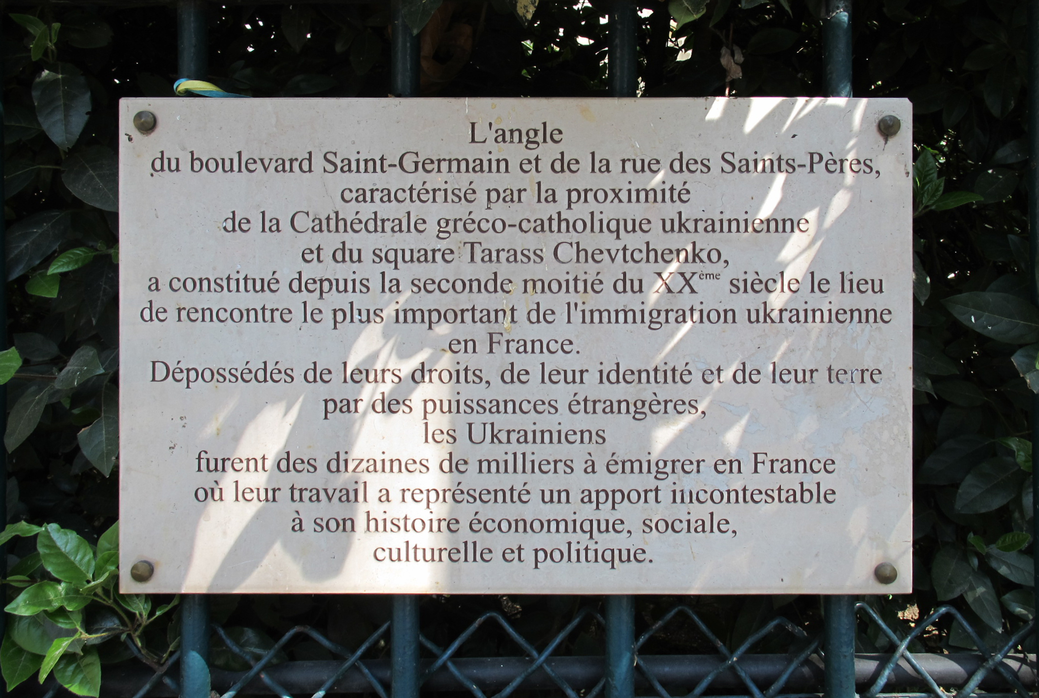 Plaque commémorative